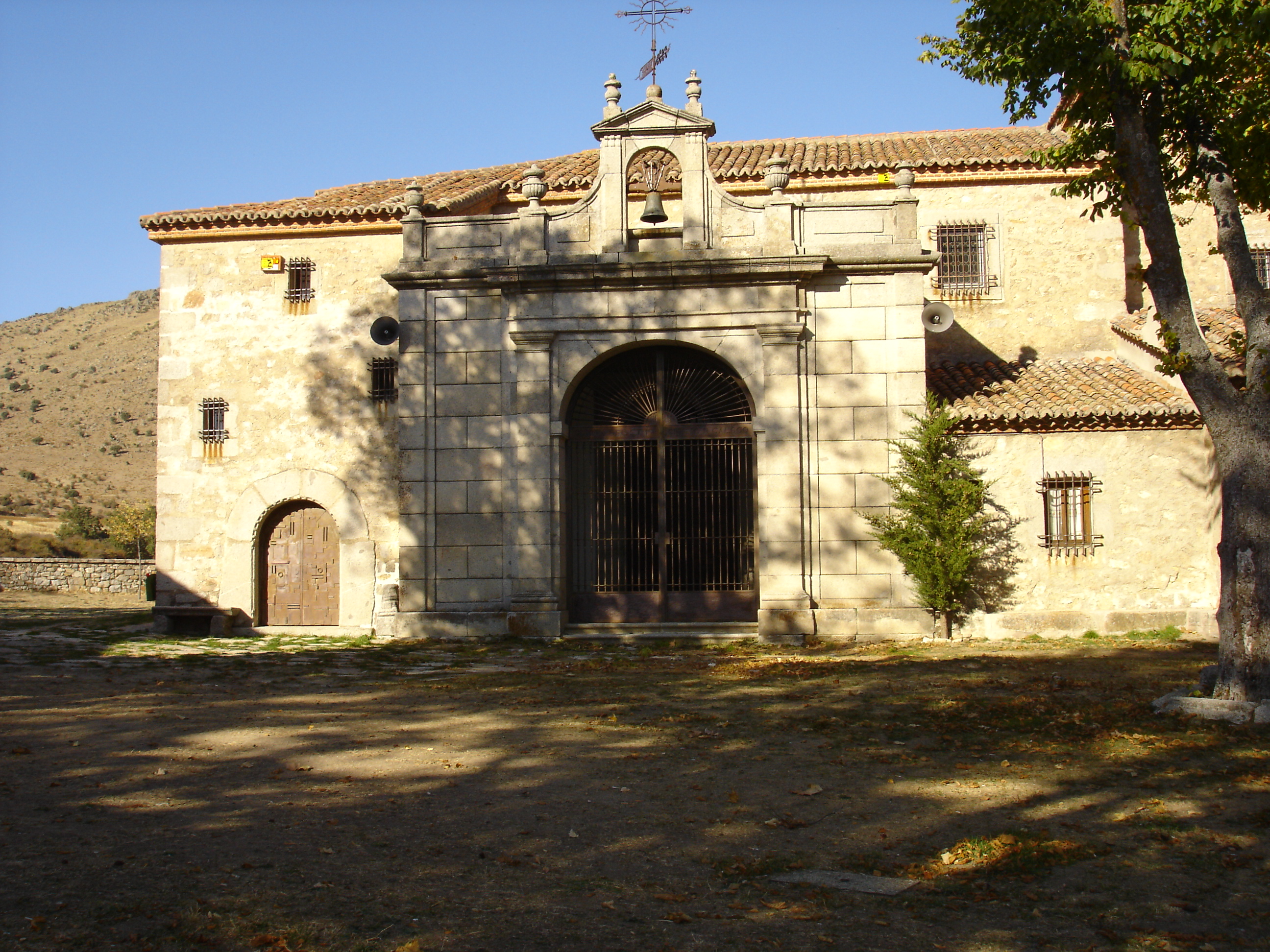 Fotografía de la Ermita de El Caloco, en El Espinar - Segovia - España